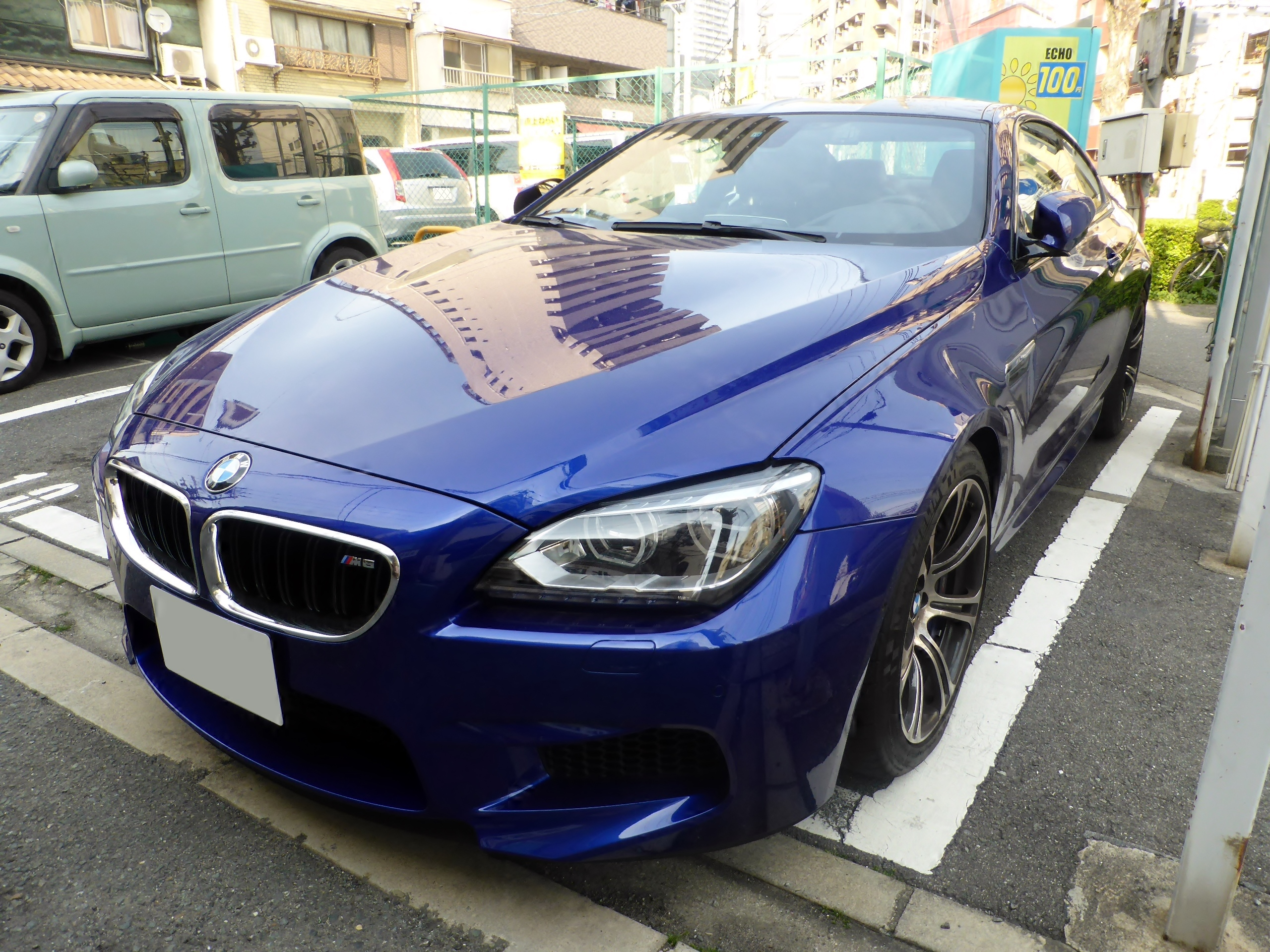 F13型BMW・M6クーペをフロントから撮影。